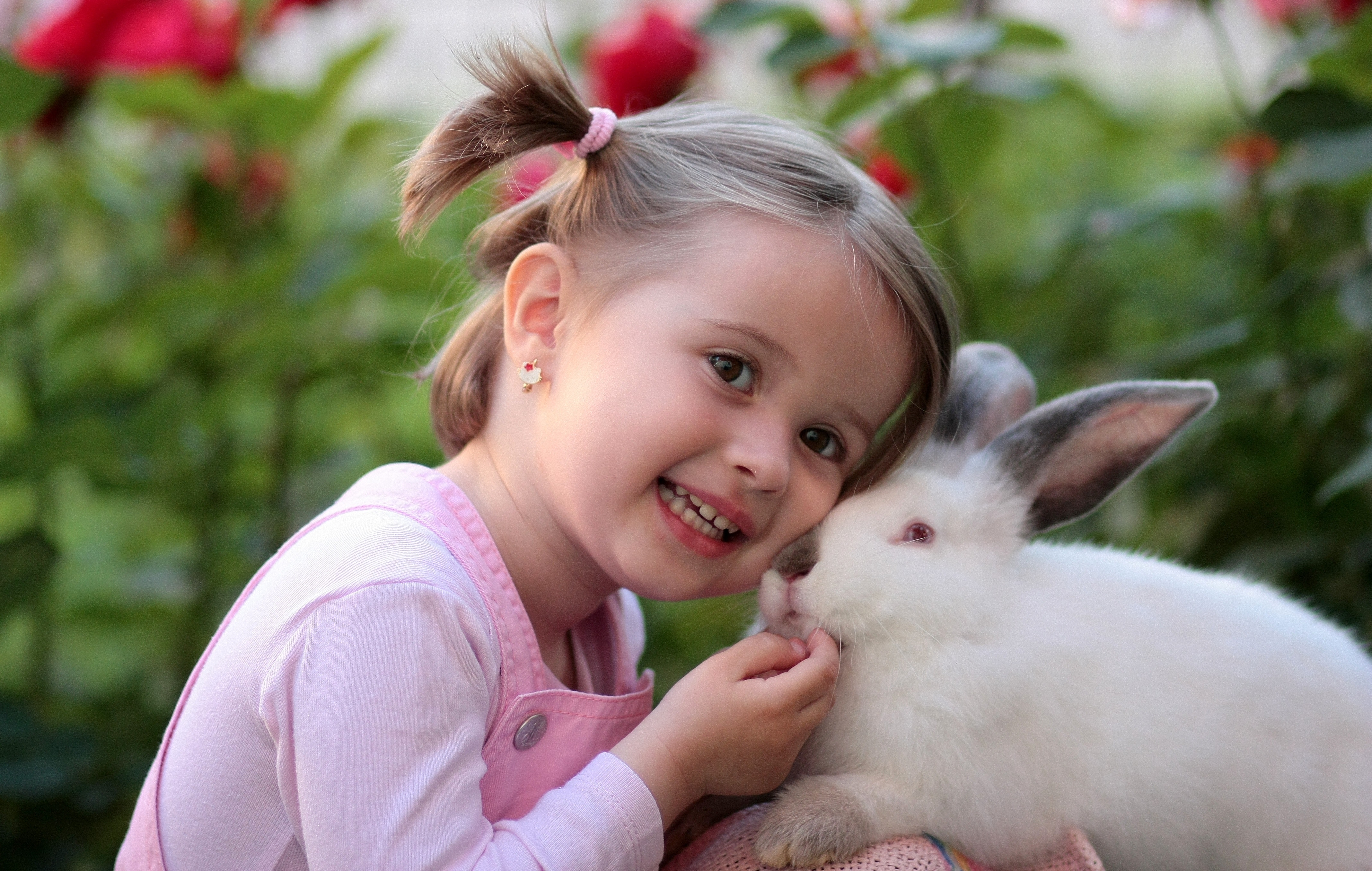 Redovito četkajte kućne ljubimce